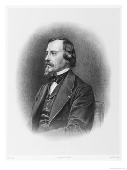 French philosopher Charles Lévêque (1818-1900)